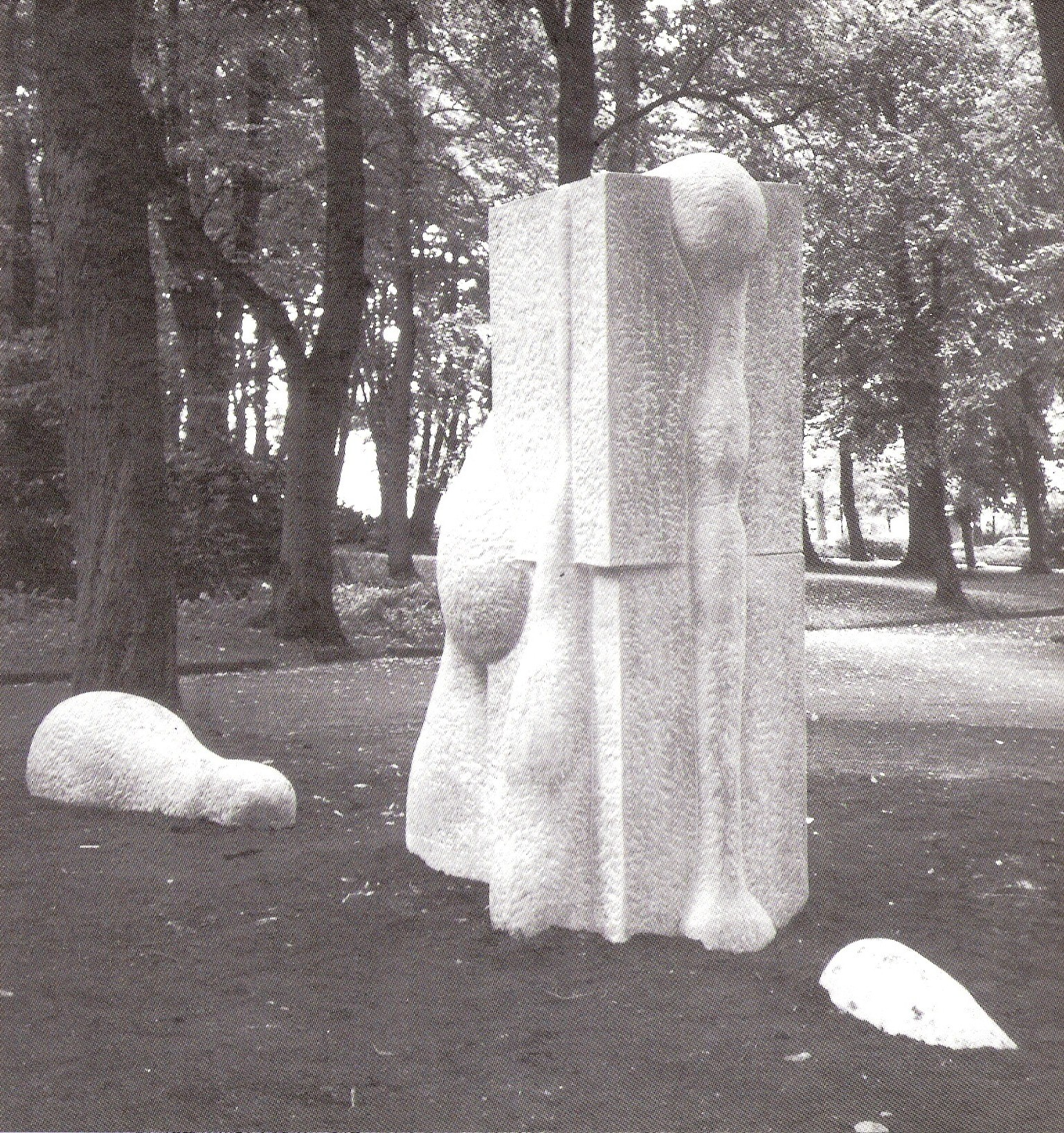 1998 "Fiume di lacrime sulla Storia - Anno 2000" in pietra Sandstein, altezza cm 250 Parco di Pirmasens (Germania)